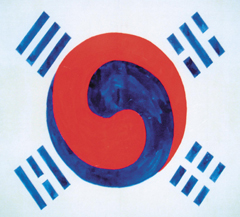 朴泳孝作朝鮮國旗